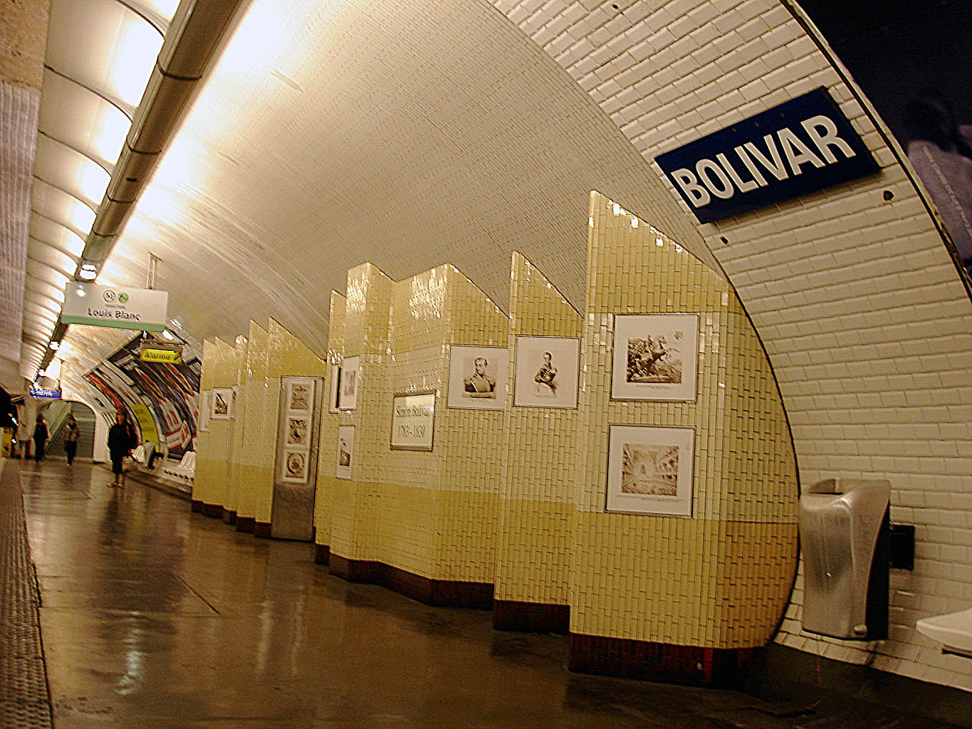 Station Bolivar, de la ligne 7bis du métro de Paris, France.